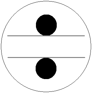 description: AccordionRegister4-16